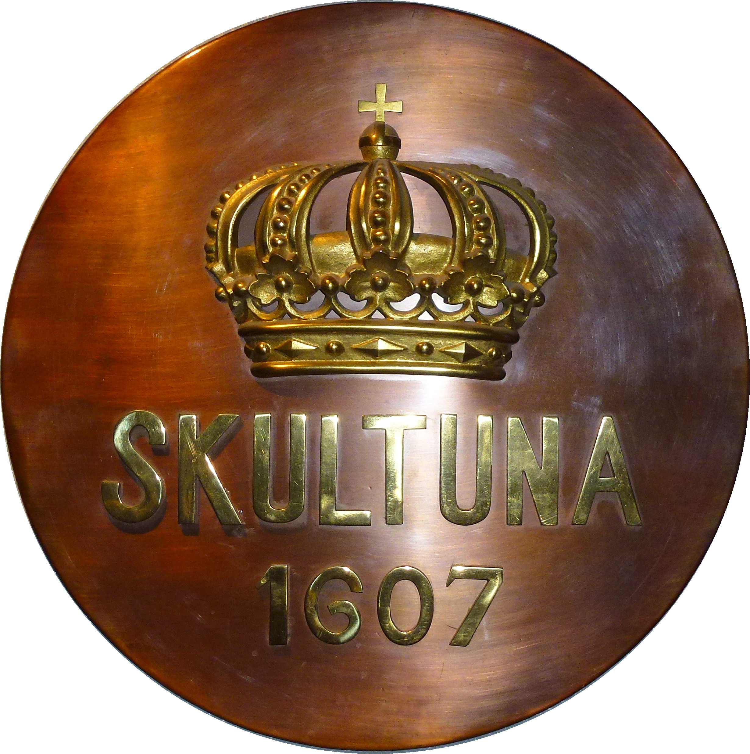 Skultuna bruk